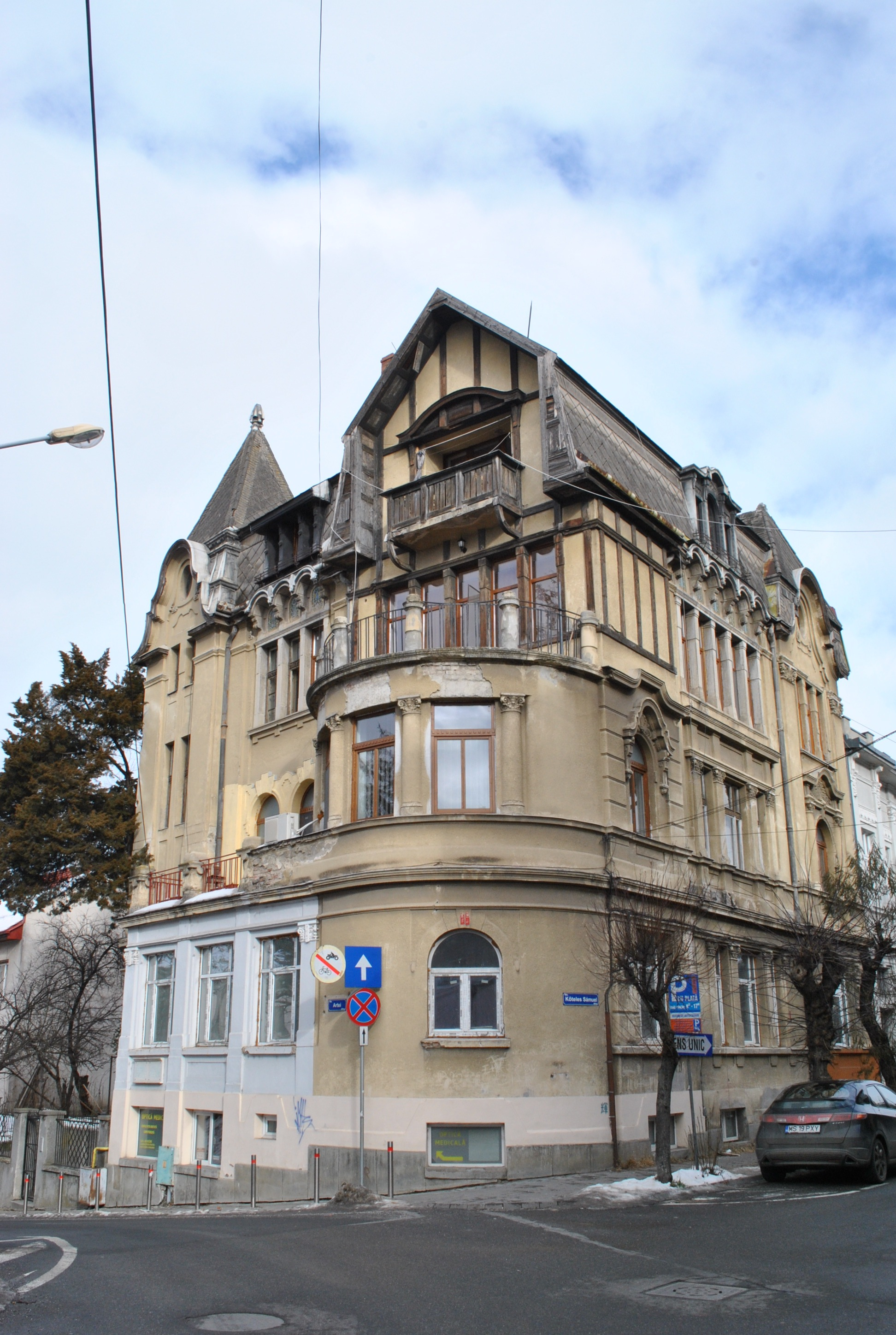 Casa Rado, 1912